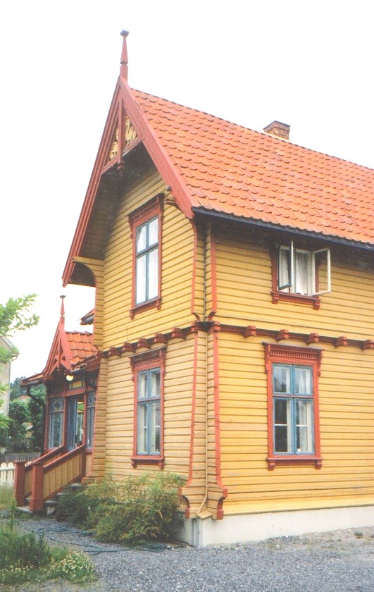 Gullagata 15 i Hønefoss